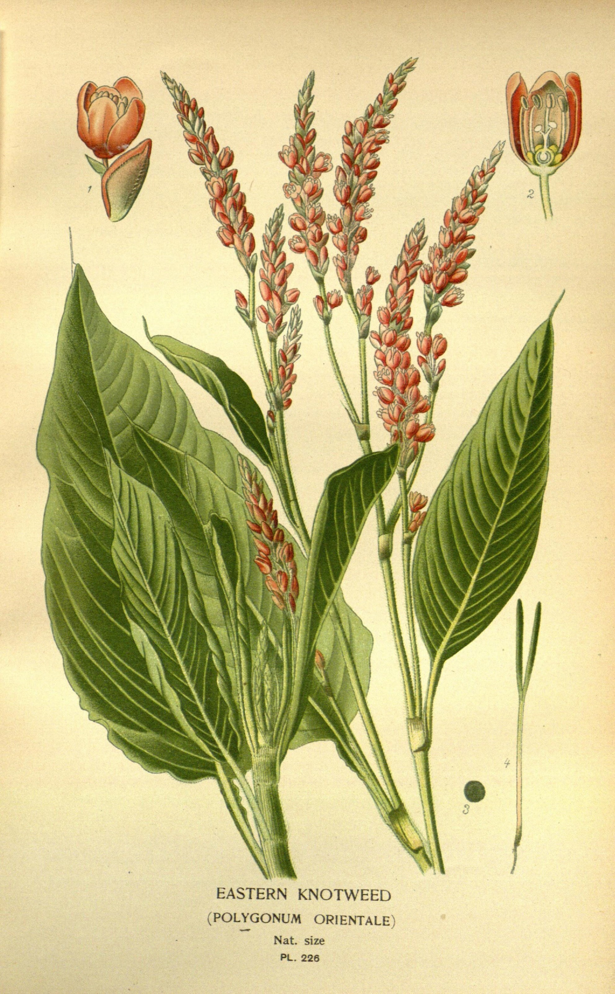 EASTERN KNOTWEED (POLYGONUM ORIENTALE)